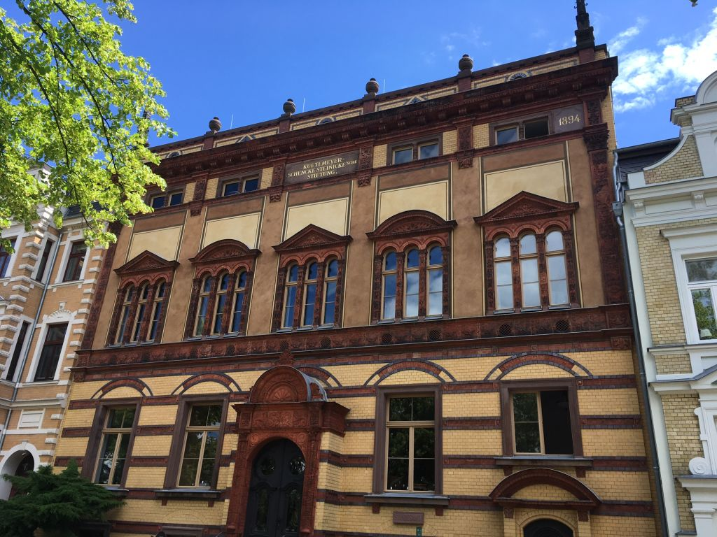 Das Alte Standesamt im Stadtteil Schelfstadt in Schwerin in der August-Bebel-Straße 29